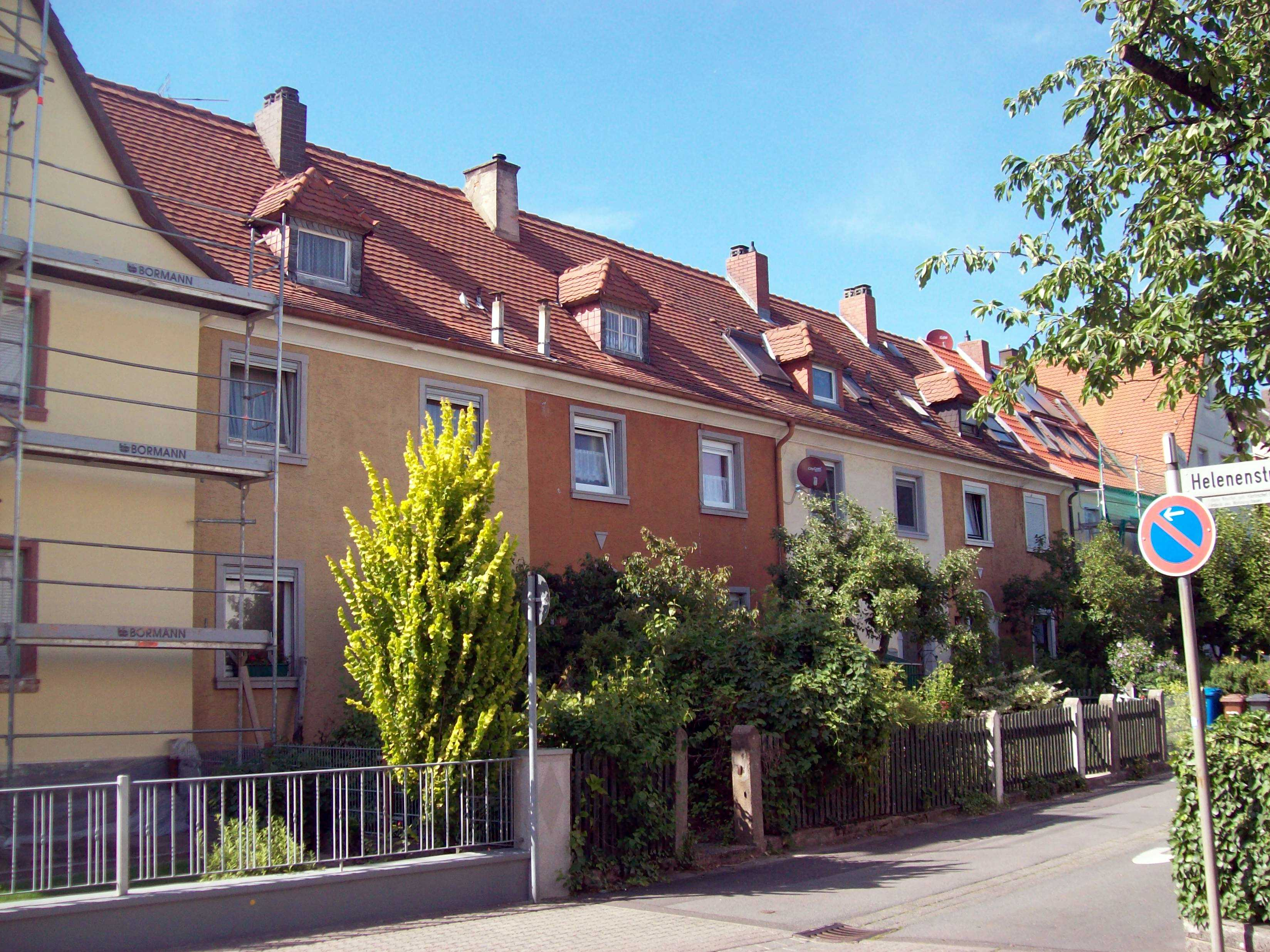 Obernauer Kolonie, Reihenhäuserzeile, Emilienstraße (Hier wohnte der Gewerkschafter, Reichstagsabgeordnete, spätere Bundestagsabgeordnete und Ehrenbürger der Stadt Aschaffenburg Hugo Karpf)